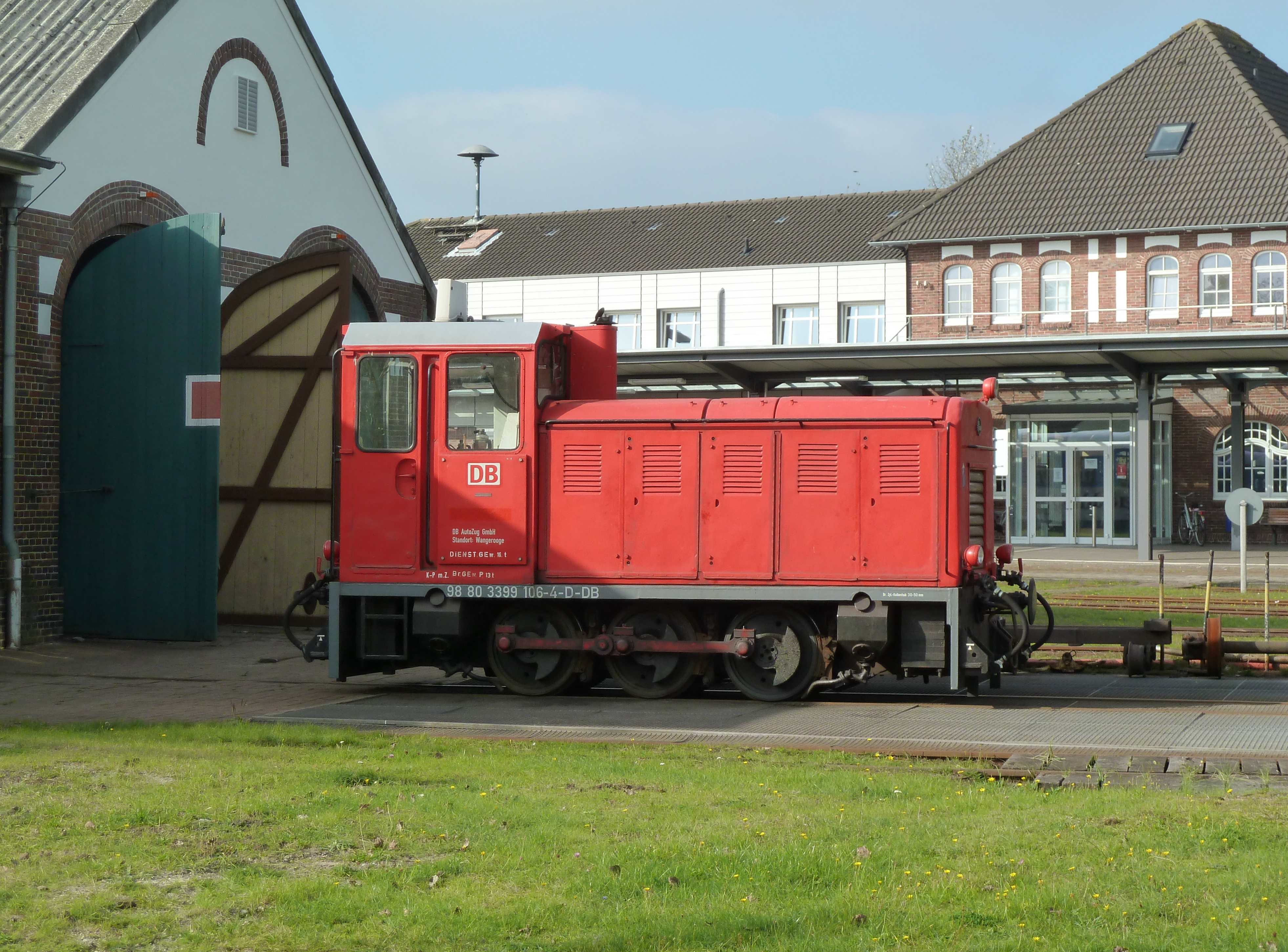 Diesellok 399 106 Typ L18H-C (Faur 25666/1990 , C dh) Wangerooge